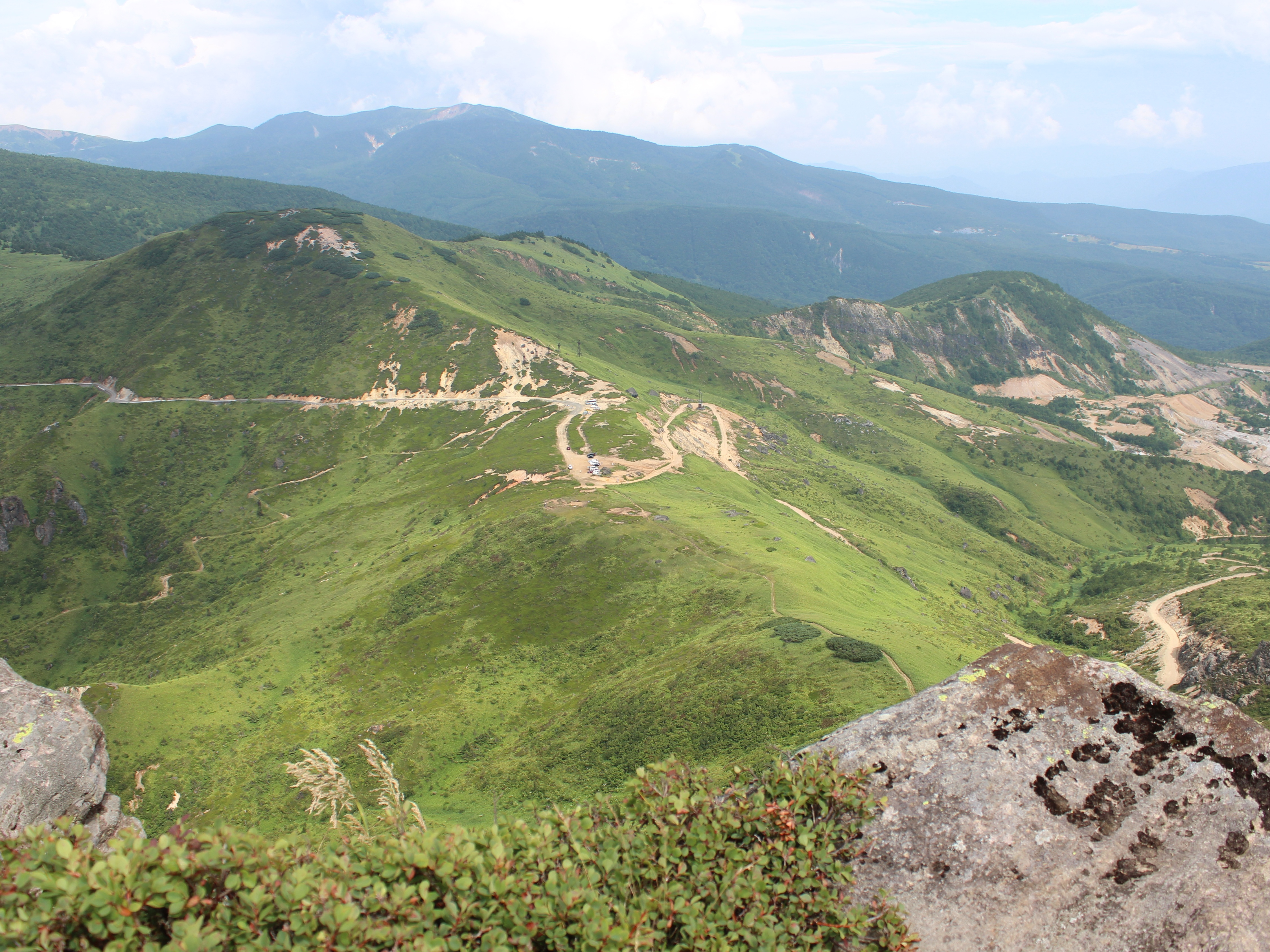 破風岳から望む毛無峠